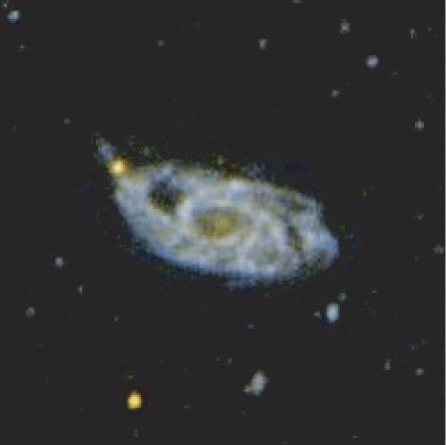 NGC 151/NGC 153